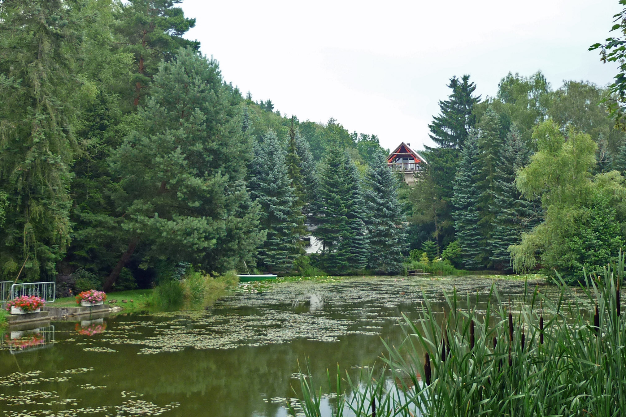 Vom Poisenbach gespeister Seerosenteich am Amselgrund in Bannewitz-Welschhufe